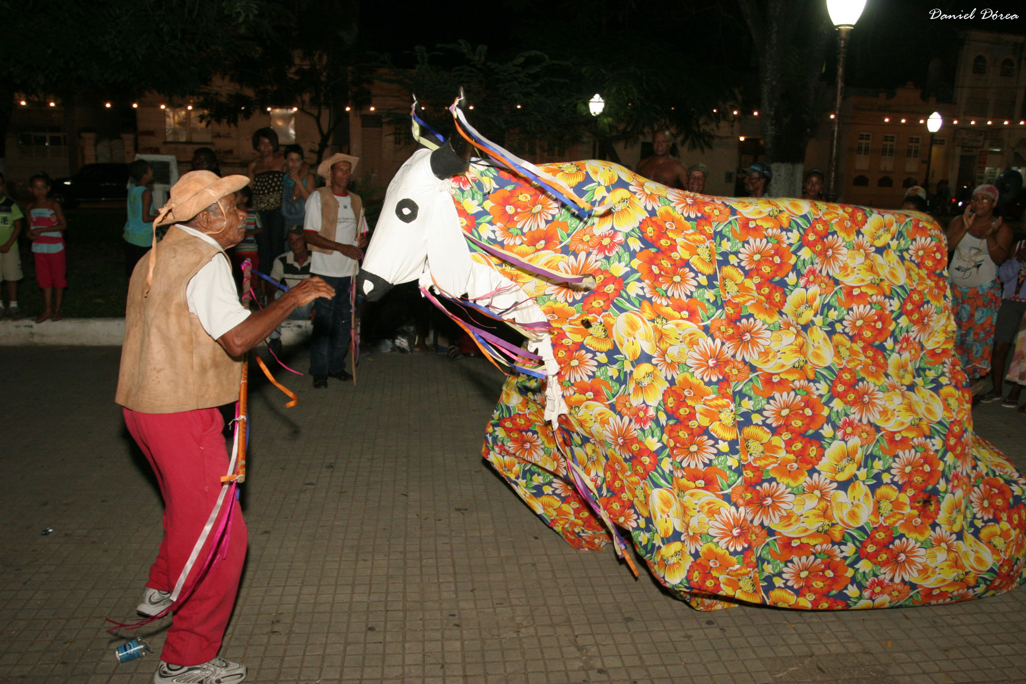 Bumba-meu-boi na praça da cidade